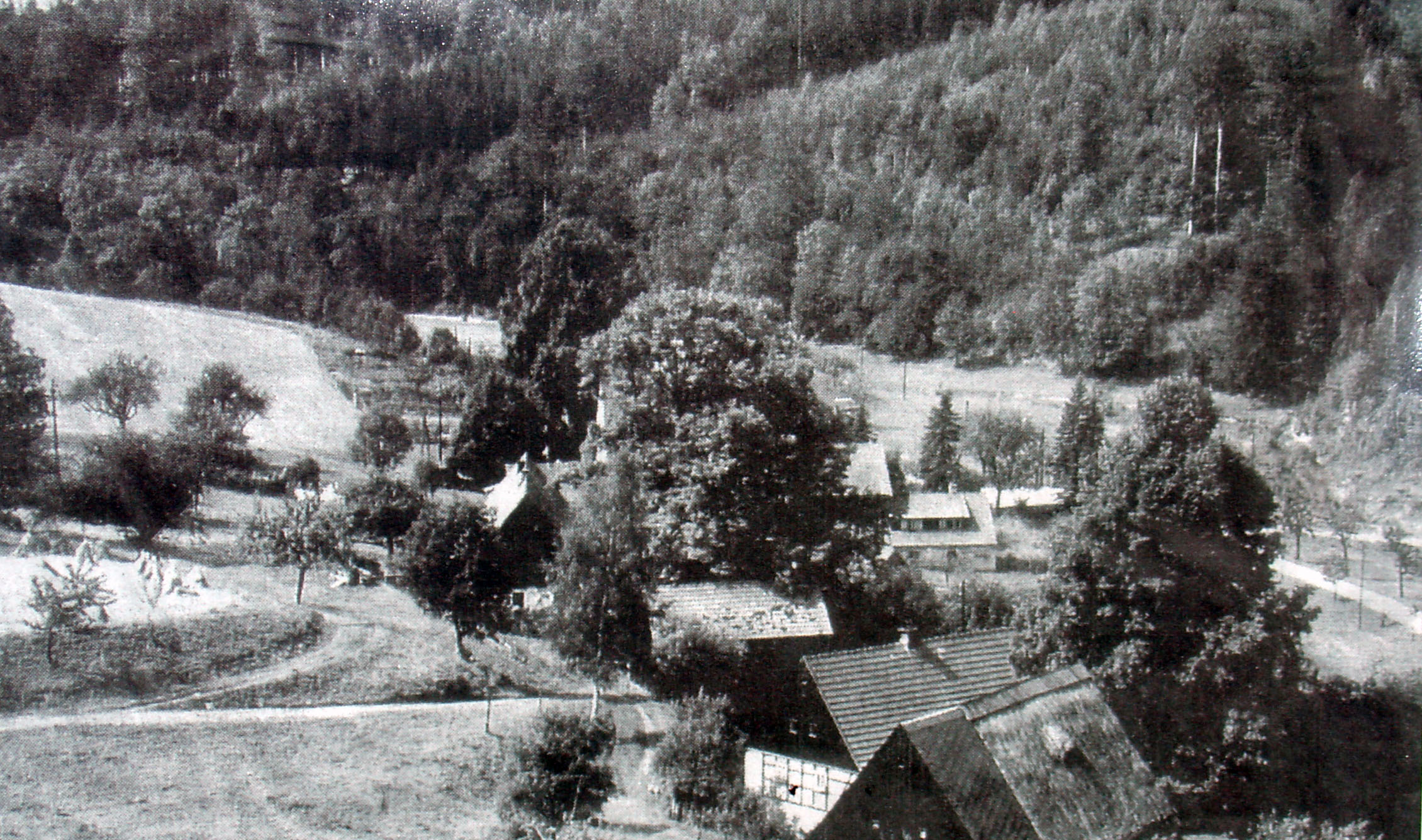 Oelsengrund